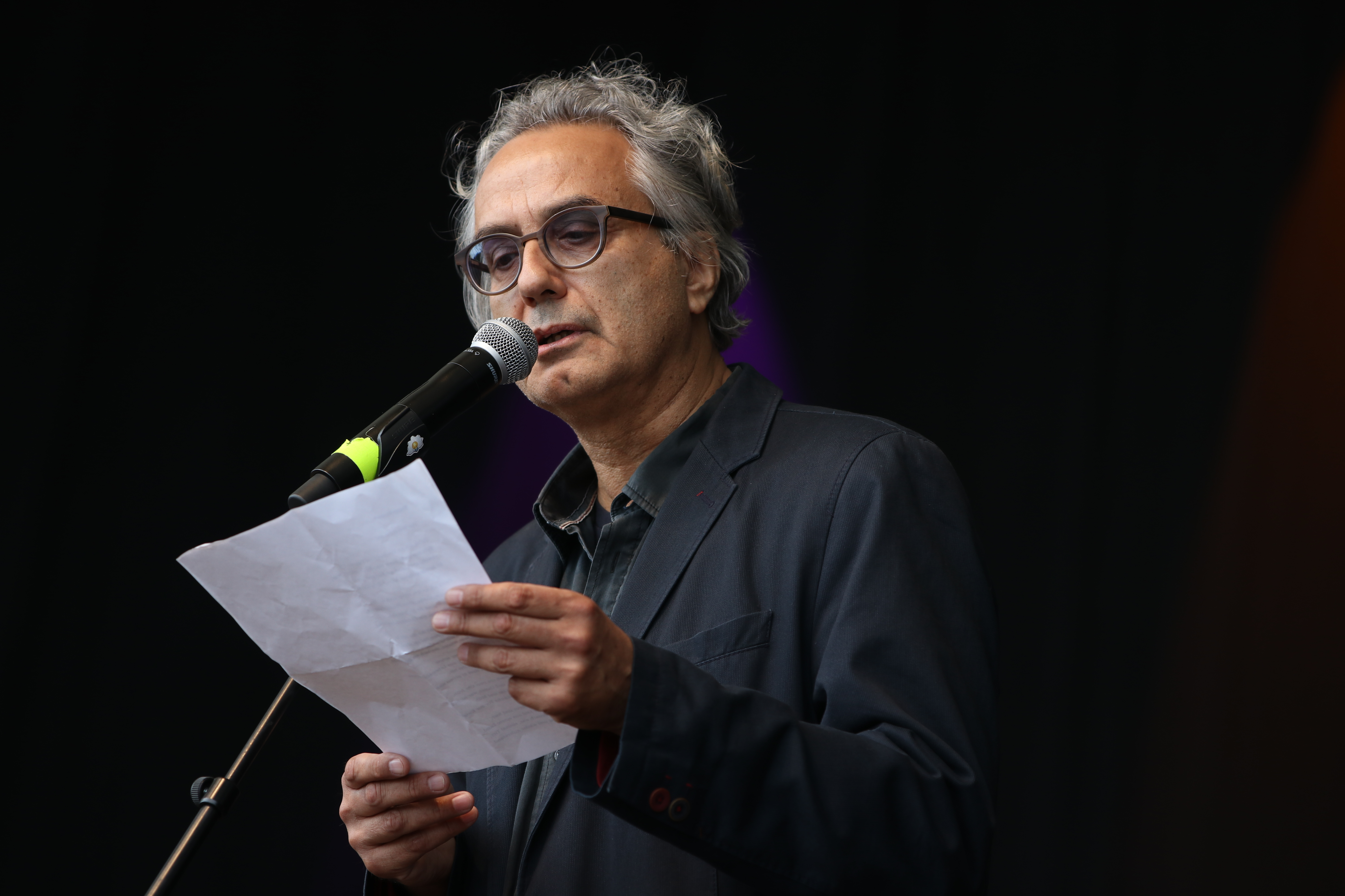 Ausgehetzt, Demonstration in München am 22. Juli 2018 gegen den Rechtsruck in der bayerischen Politik